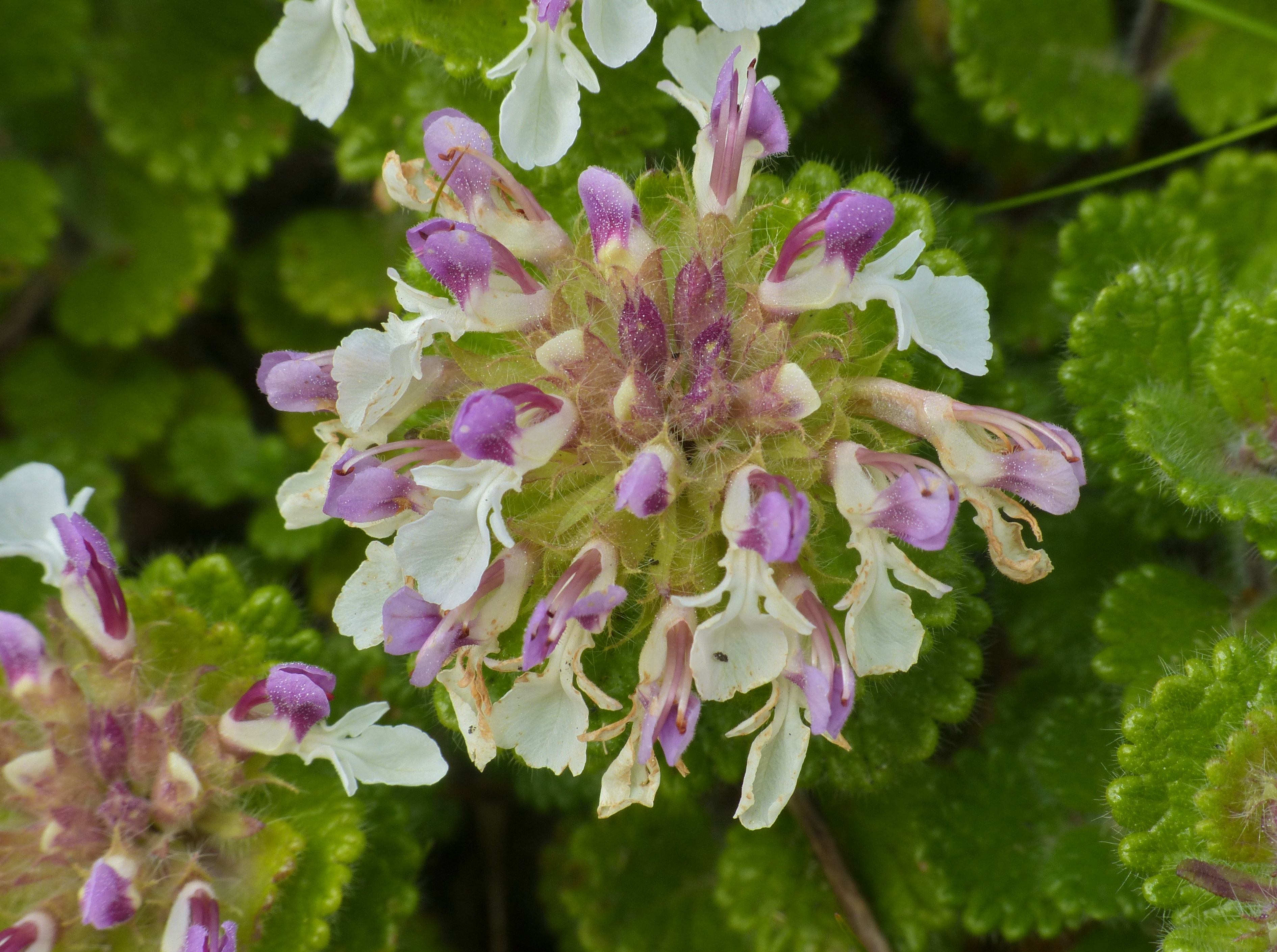 Mirador El Collado, Camijanes, Herrerias, Cantabria, SPAIN